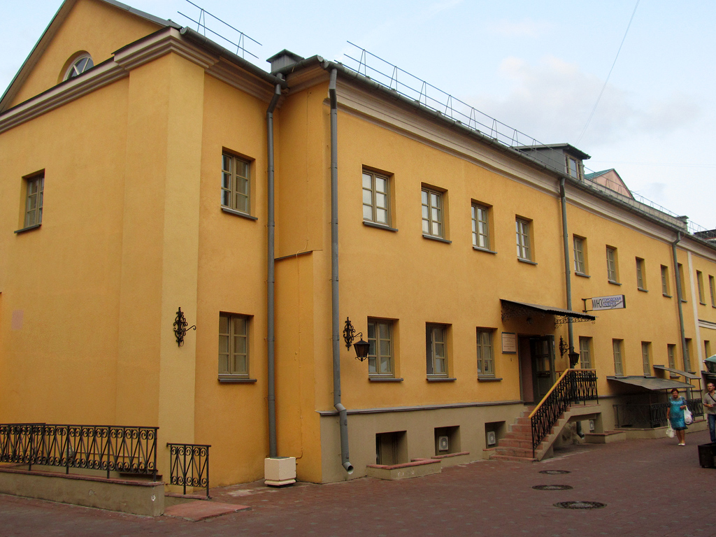 Мінск. Вуліца Рэвалюцыйная, 10